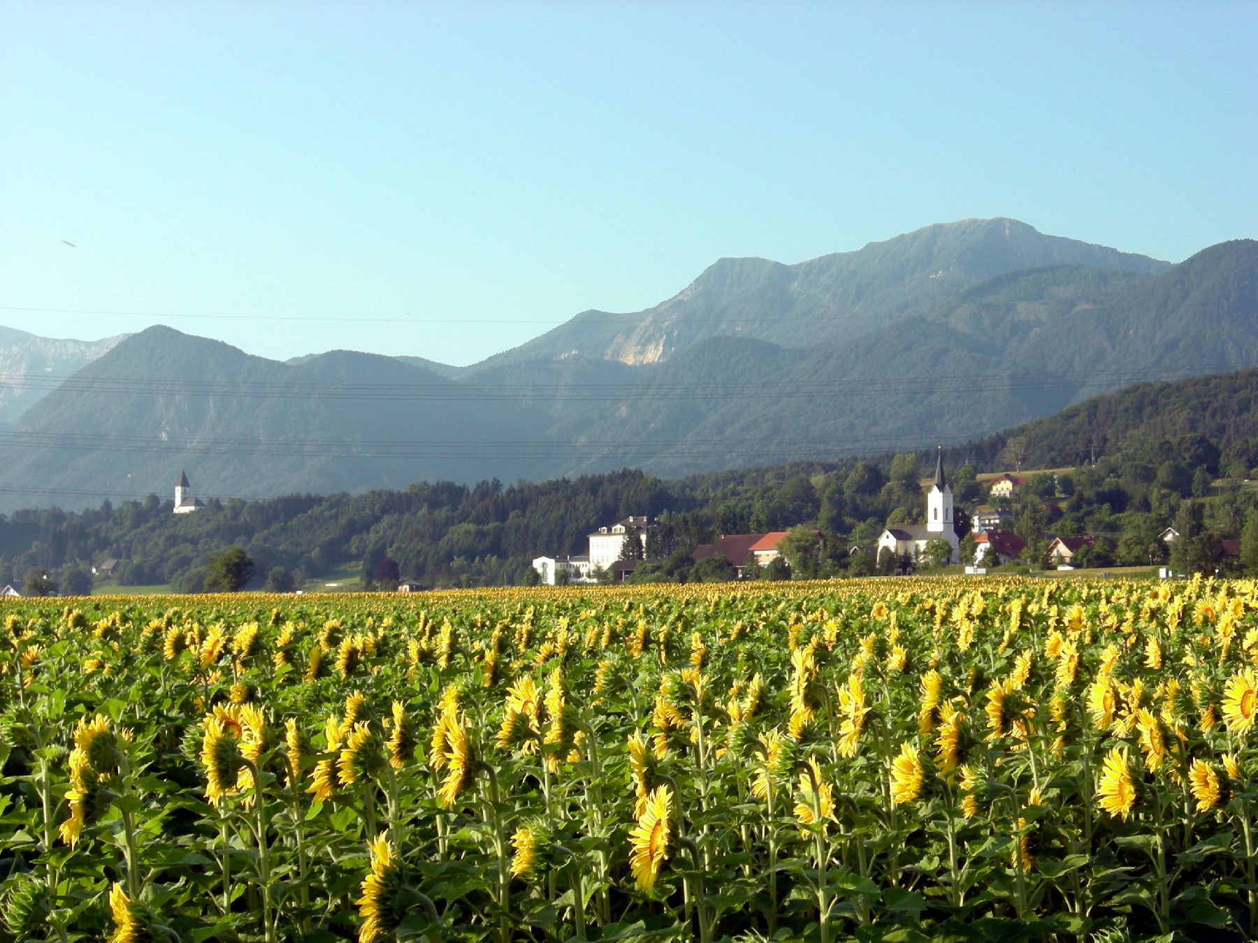 St. Peter (Ortsteil von St. Jakob im Rosental) mit Karawanken im Hintergrund